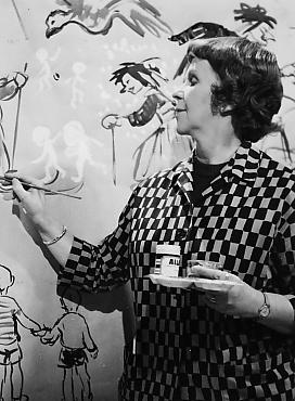 Kylli Koski vuonna 1960.